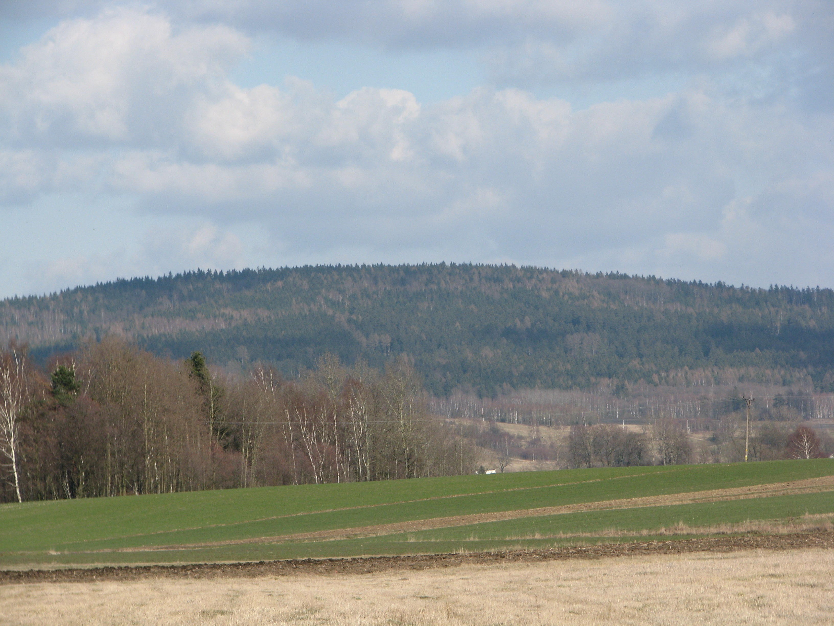 Góra Ziuty